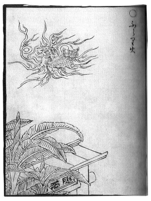 Furari-bi (ふらり火) from the Gazu Hyakki Yakō (画図百鬼夜行)